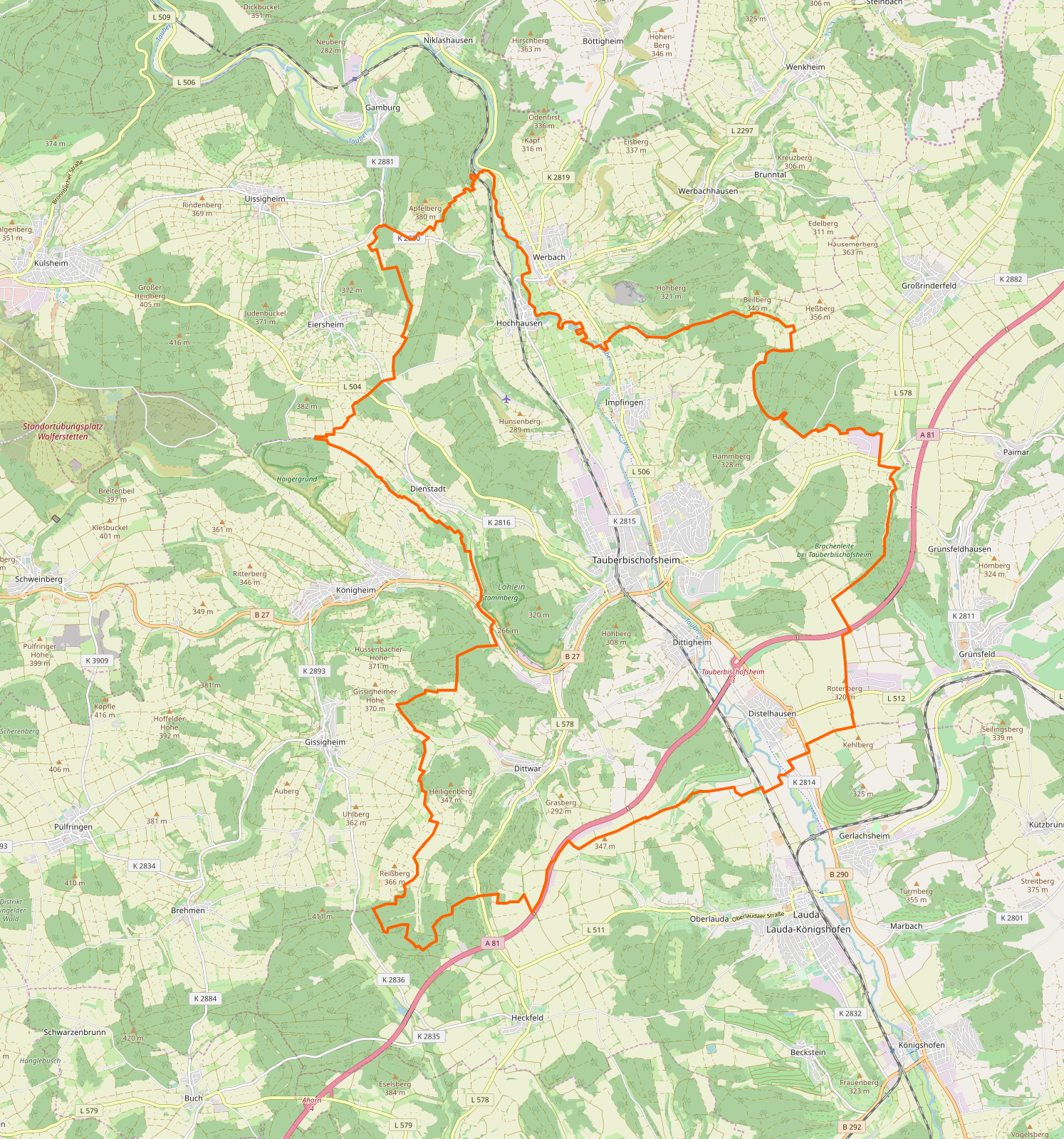 Gemarkung und Lage der Stadt Tauberbischofsheim. Siehe auch: Liste der Kulturdenkmale in Tauberbischofsheim. Liste der Straßennamen von Tauberbischofsheim. Gemarkungen und Lagen der Städte und sonstigen Gemeinden im Main-Tauber-Kreis: Ahorn · Assamstadt · Bad Mergentheim · Boxberg · Creglingen · Freudenberg · Großrinderfeld · Grünsfeld · Igersheim · Königheim · Külsheim · Lauda-Königshofen · Niederstetten · Tauberbischofsheim · Weikersheim · Werbach · Wertheim · Wittighausen